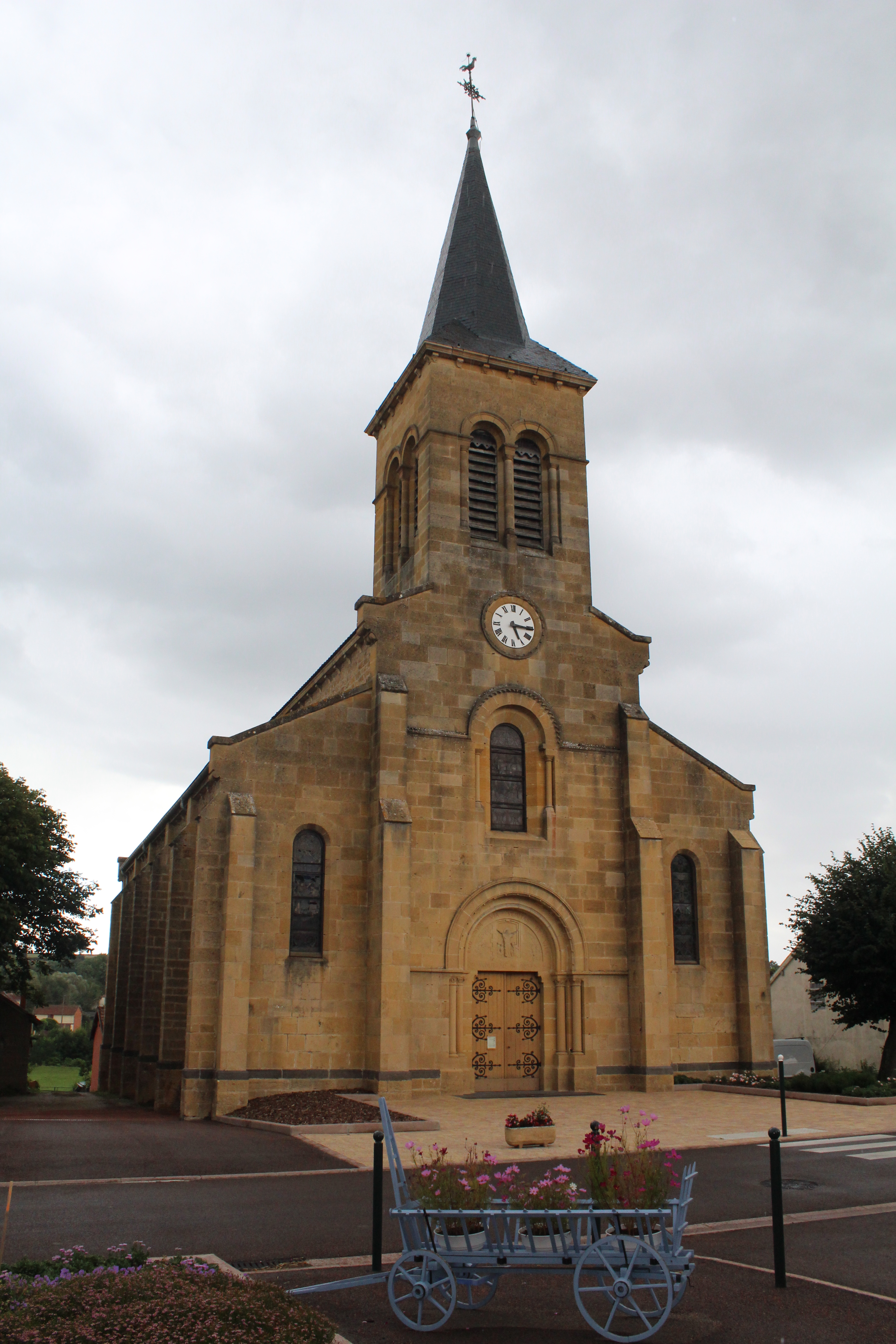 Église Saint-Pierre-et-Saint-Paul de Céron.